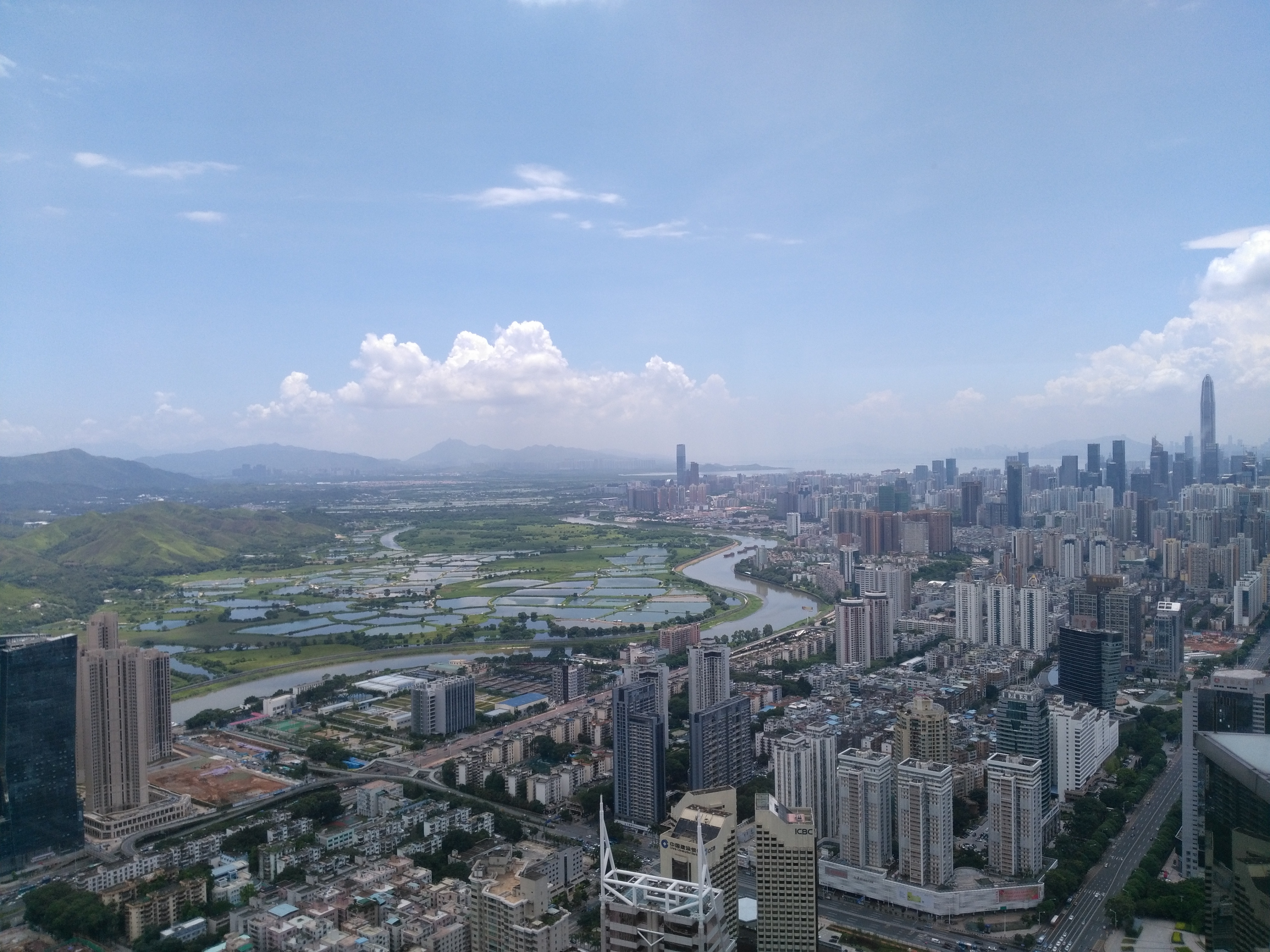 从深圳市地王大厦“地王观光”观景台上俯视鹏城